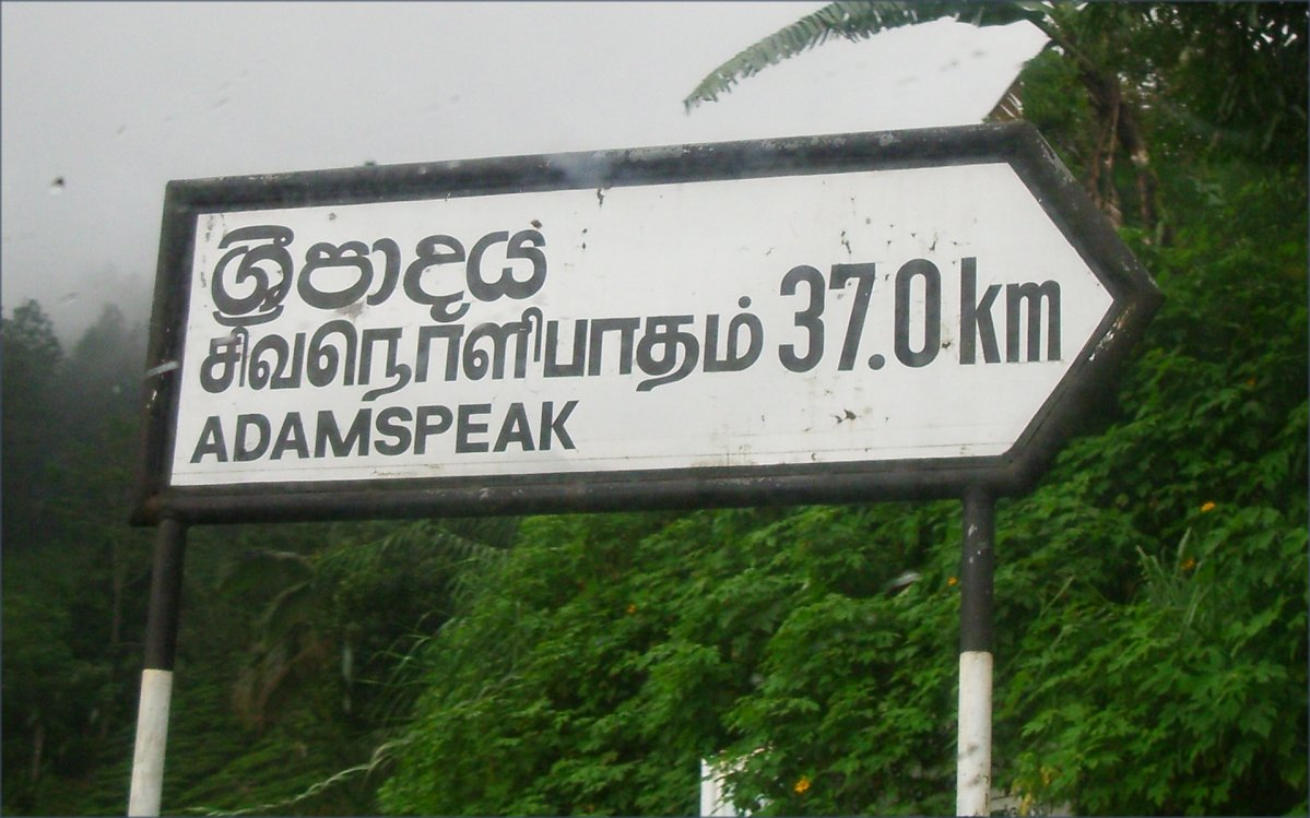 Cartell indicant el pic d'Adam, el segon mes alt d'Sri Lanka i el mes conegut, foto feta per J. Ollé el juliol del 2006